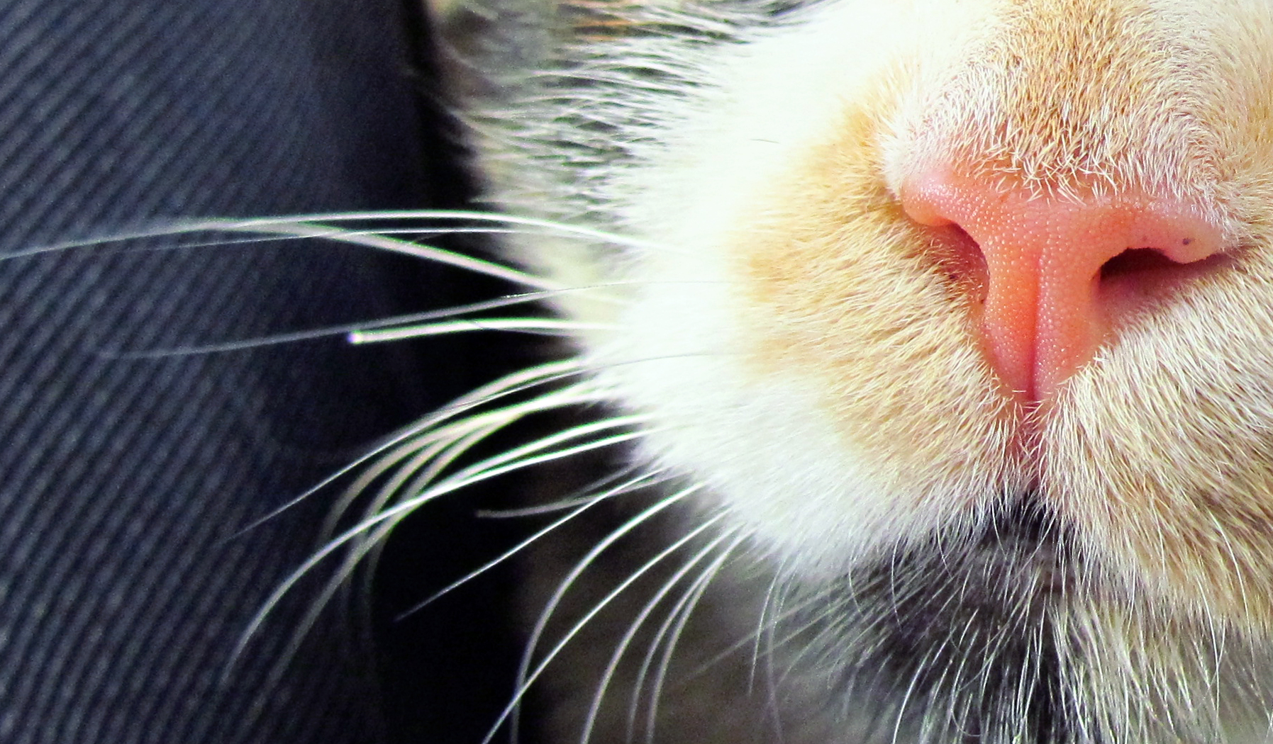 رده:تصاویر نامزد انتقال به انبار